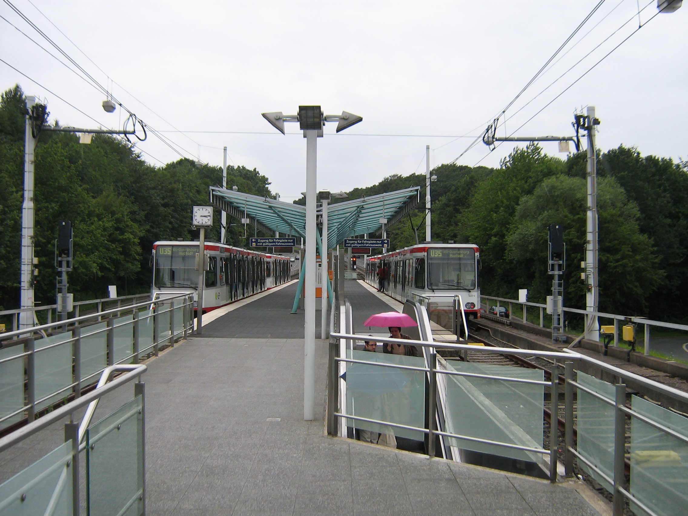 Zwei Züge auf der U35 an der Endhaltestelle Hustadt in Bochum